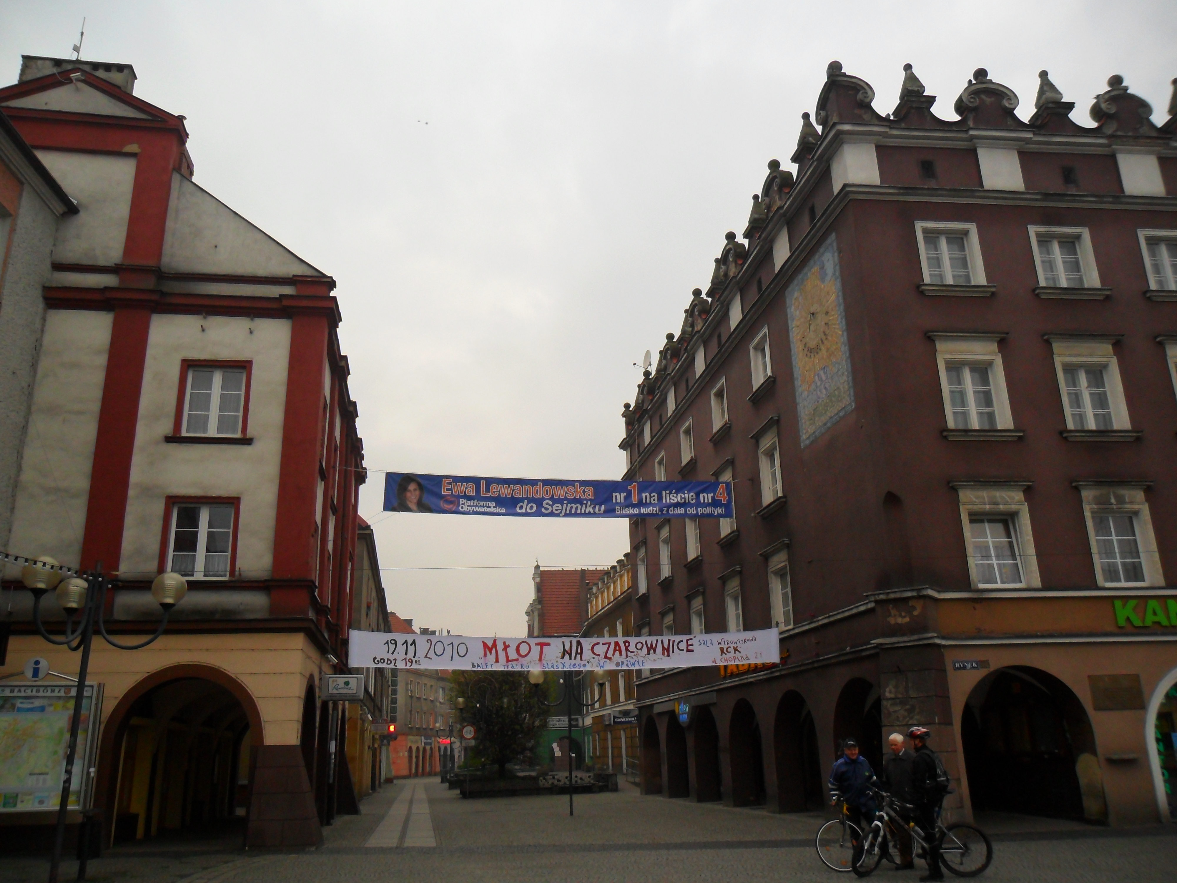 Początek ulicy Długiej na rynku w Raciborzu.